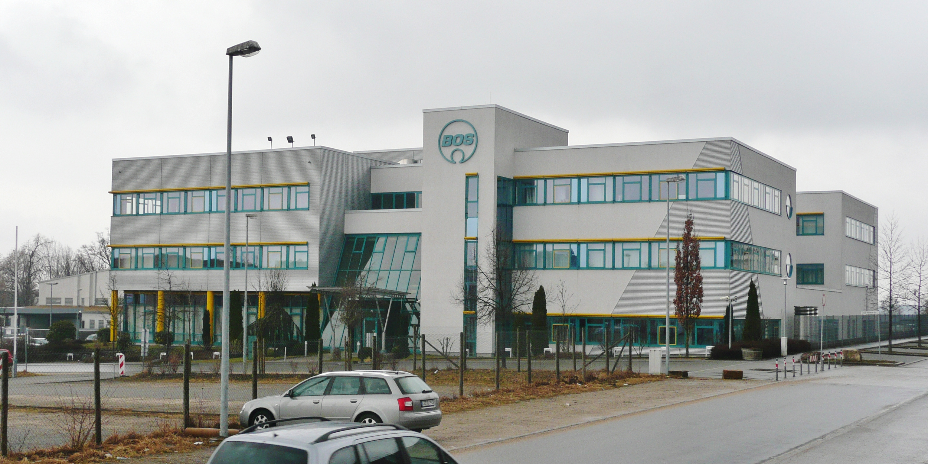 BOS GmbH & Co. KG, Ostfildern, Scharnhauser Park